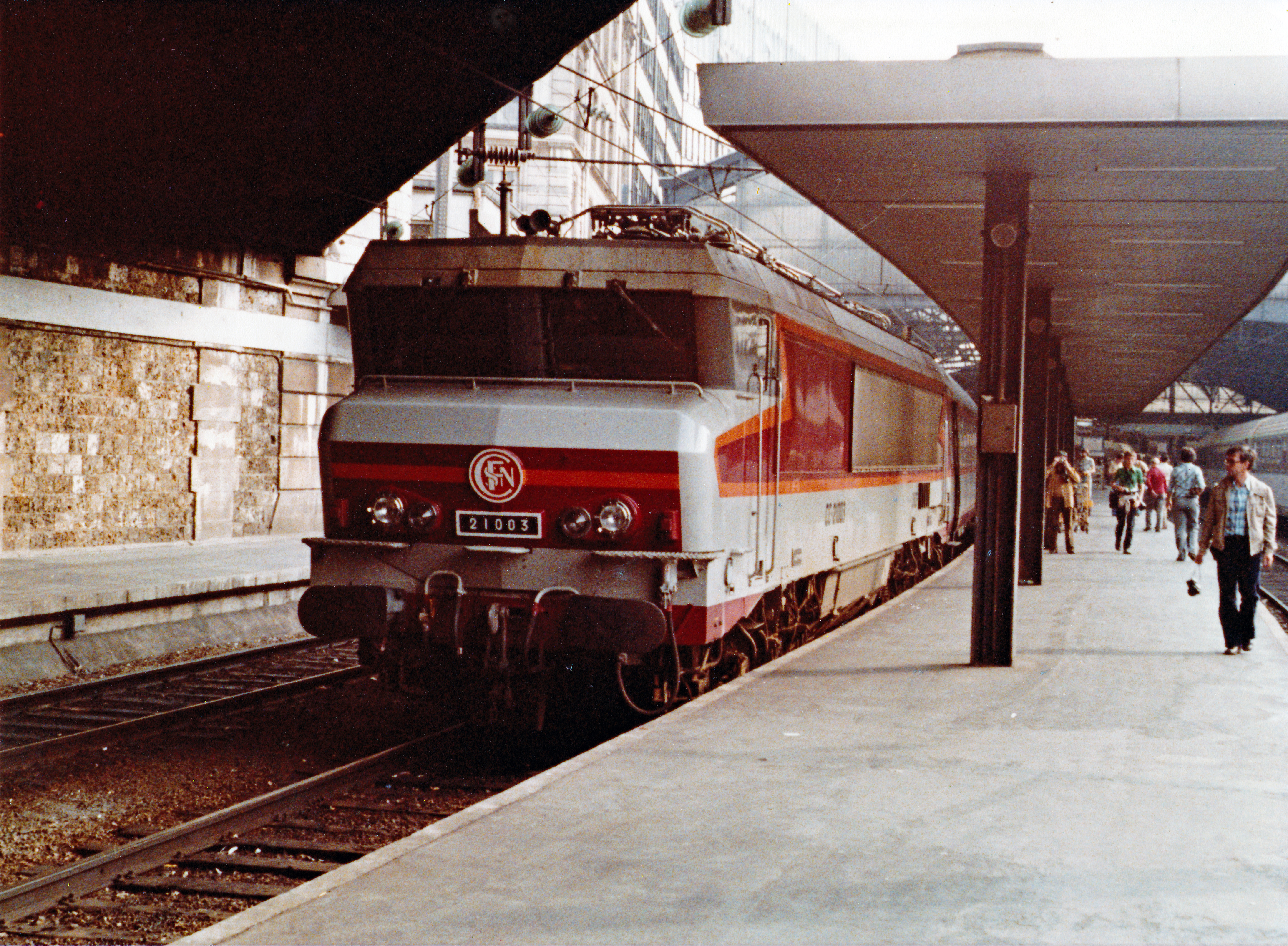 Gare St Lazare voyage COPEF banlieue de Paris